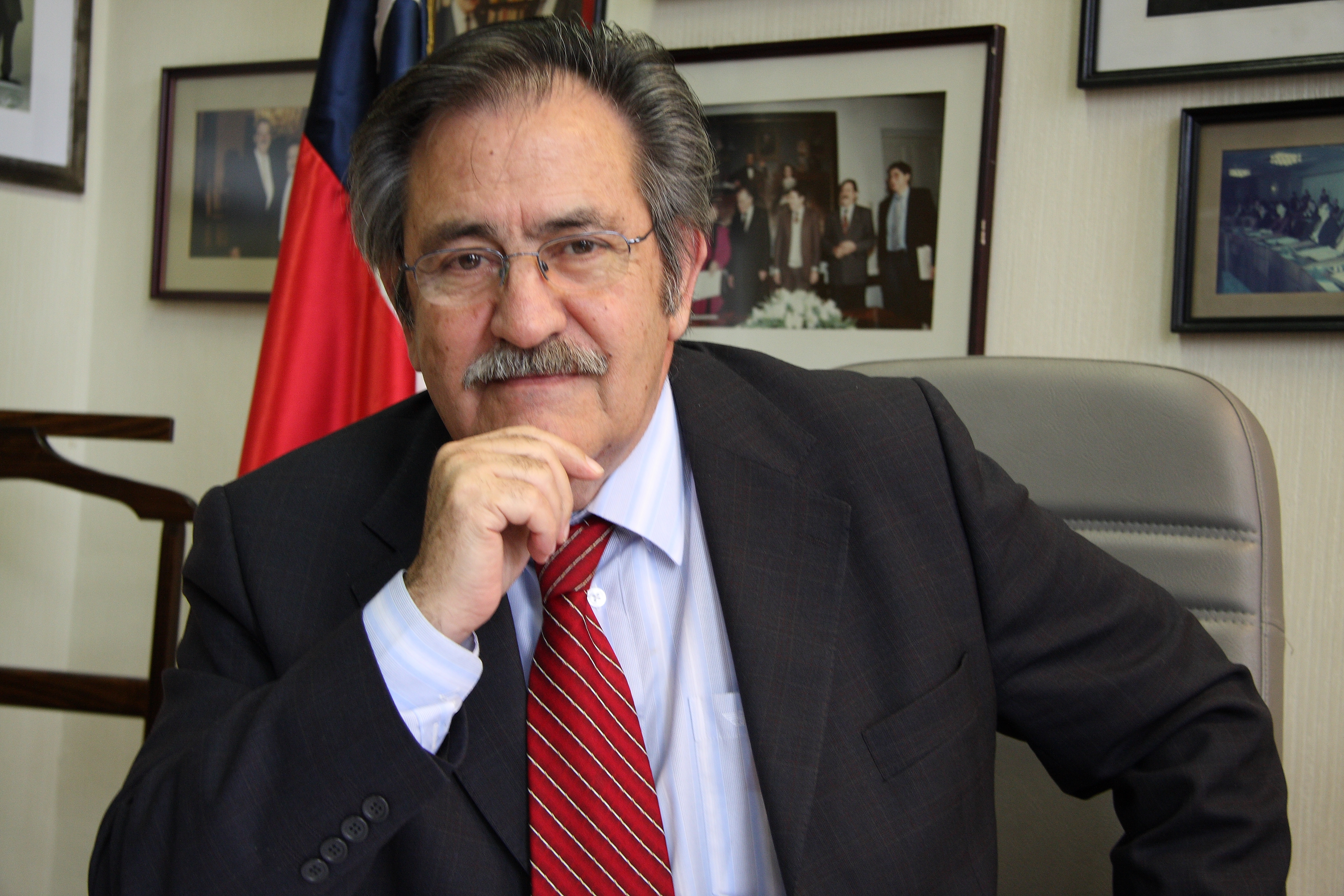 Ricardo Núñez Muñoz.